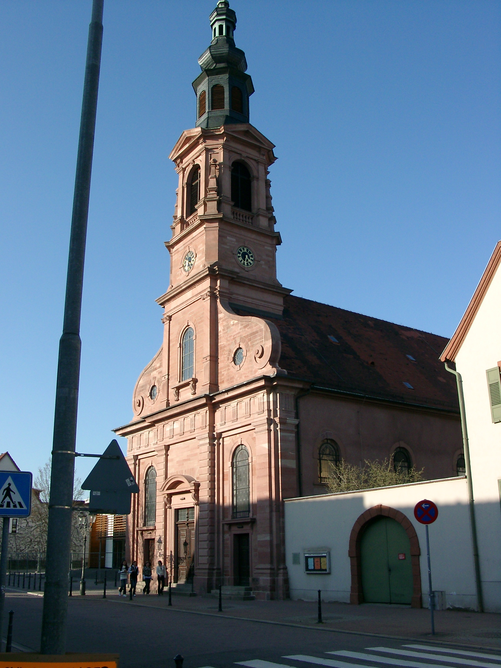 Schwetzingen, Evangelische Stadtkirche